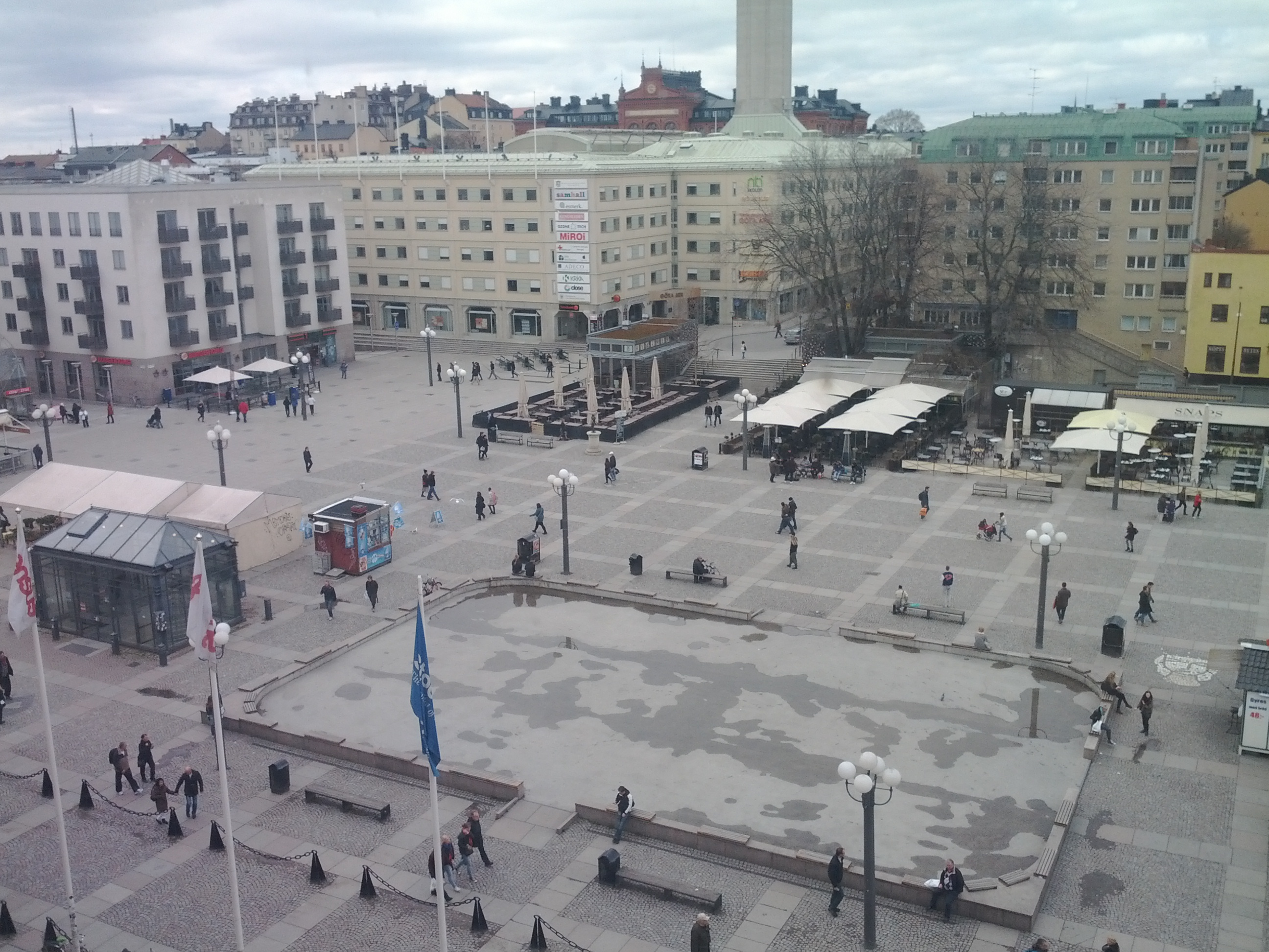 Medborgarplatsen 2012